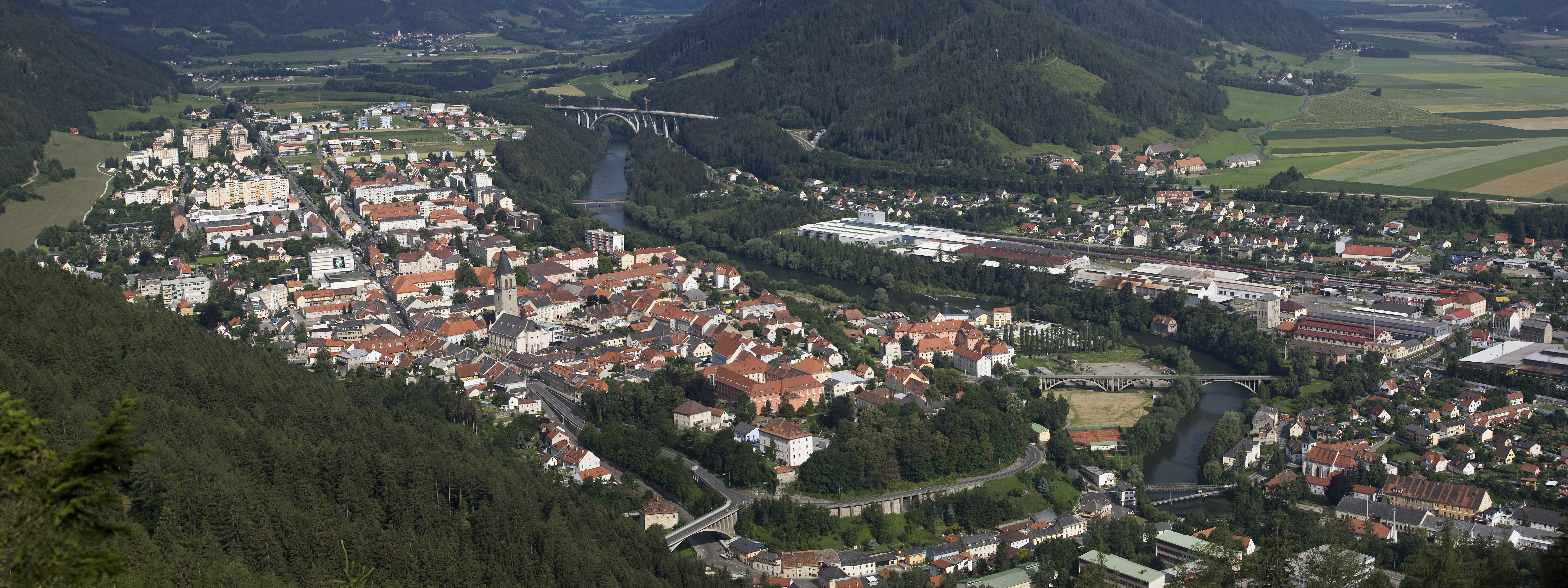 Blick auf Judenburg vom Liechtensteinberg aus. Das Bild zeigt die Stadt von der Ostseite, noch vor dem Abriss der alten Murbrücke.